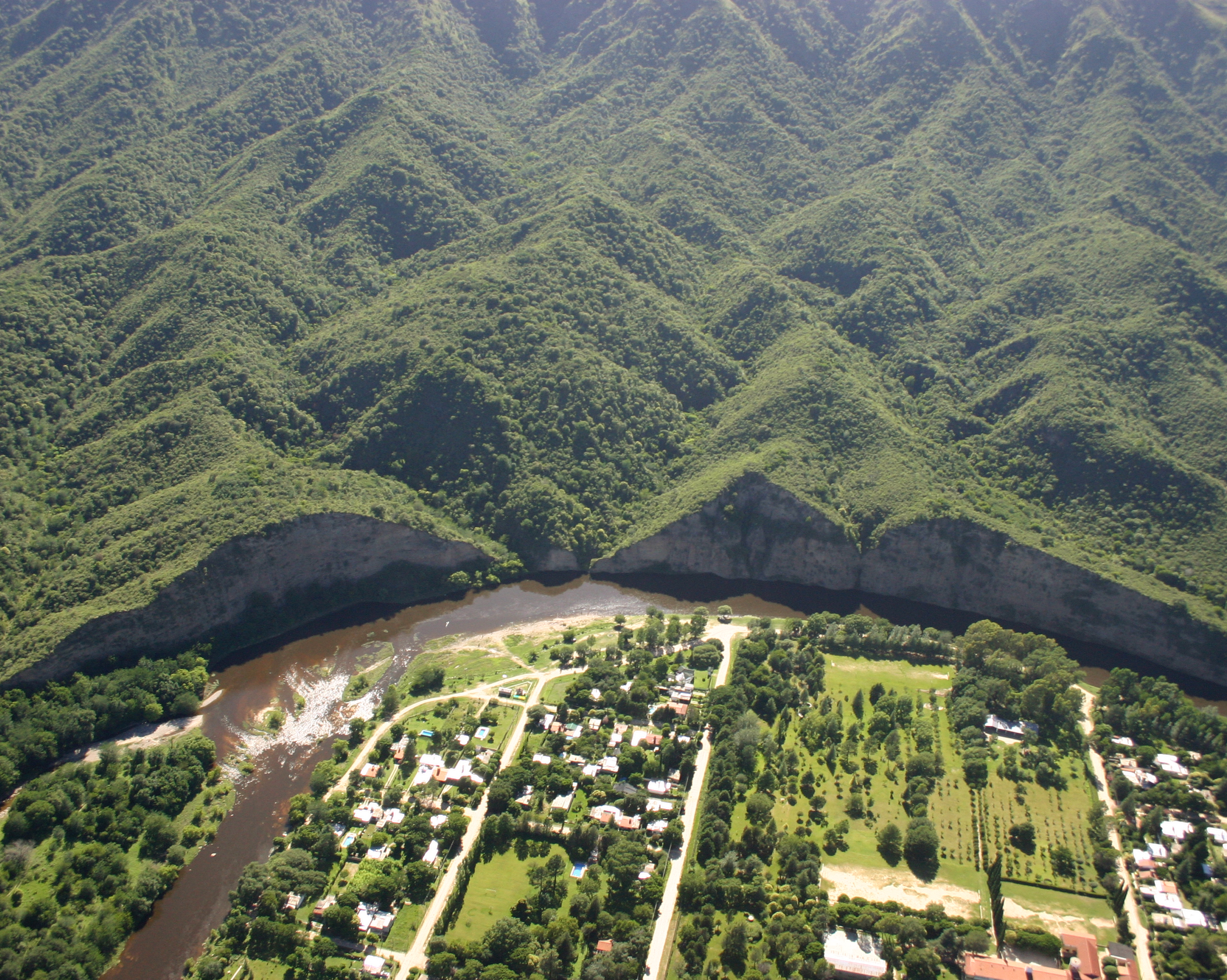 Bialet Massé, Provincia de Córdoba, Argentina